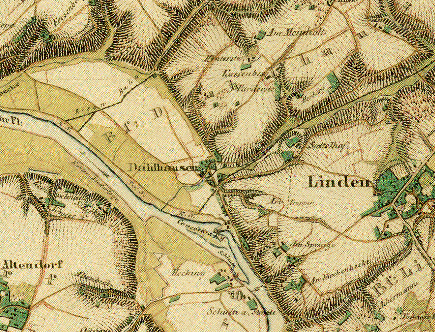 Bochum-Dahlhausen, Deutschland, auf dem Meßtischblatt von 1843.